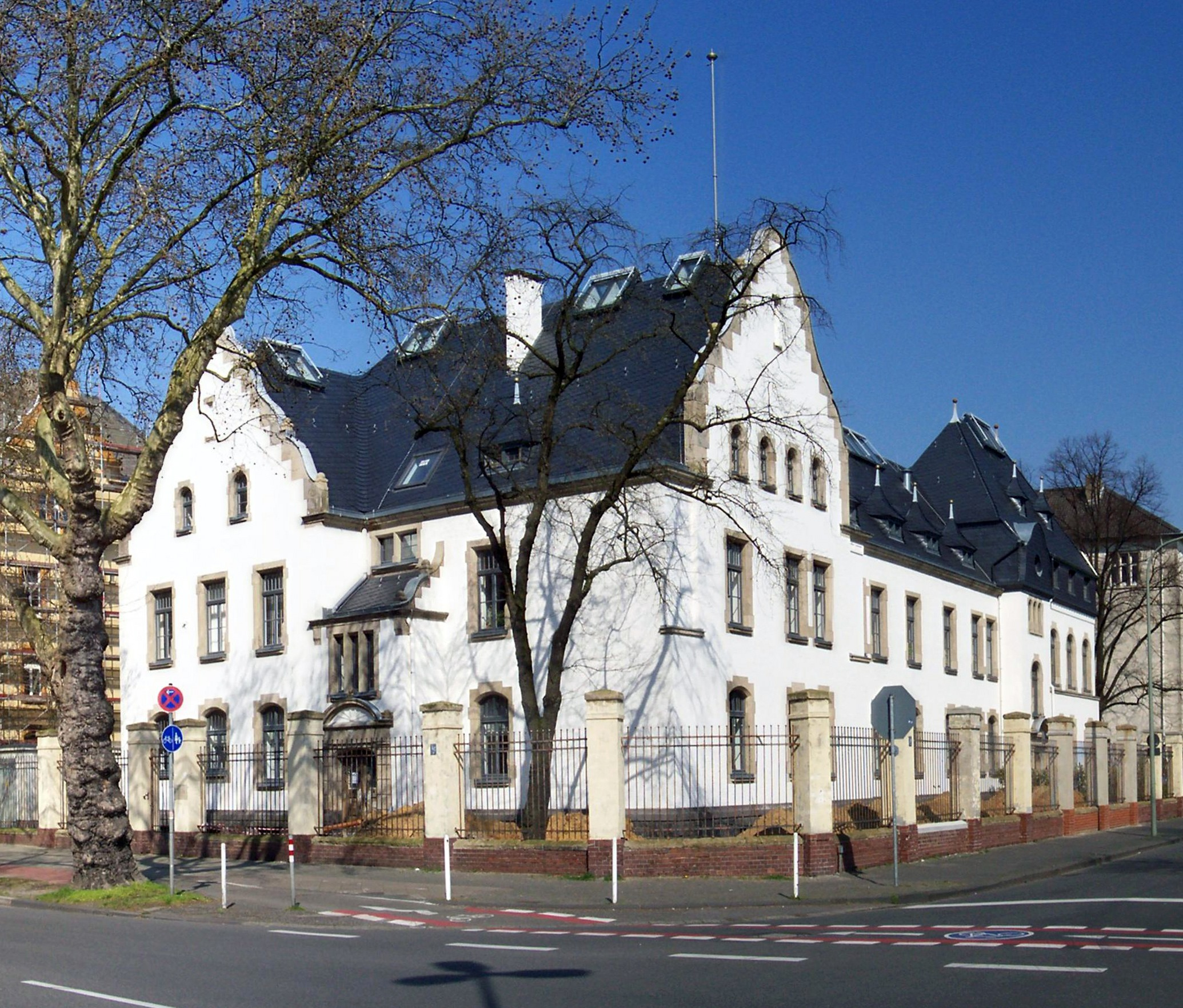 Krefeld, Ehemaliges Stabsgebäude, Westparkstraße 105, Denkmal Nr. 630 This image shows a heritage building in Germany, located in the North Rhine-Westphalian city Krefeld (no. 630).